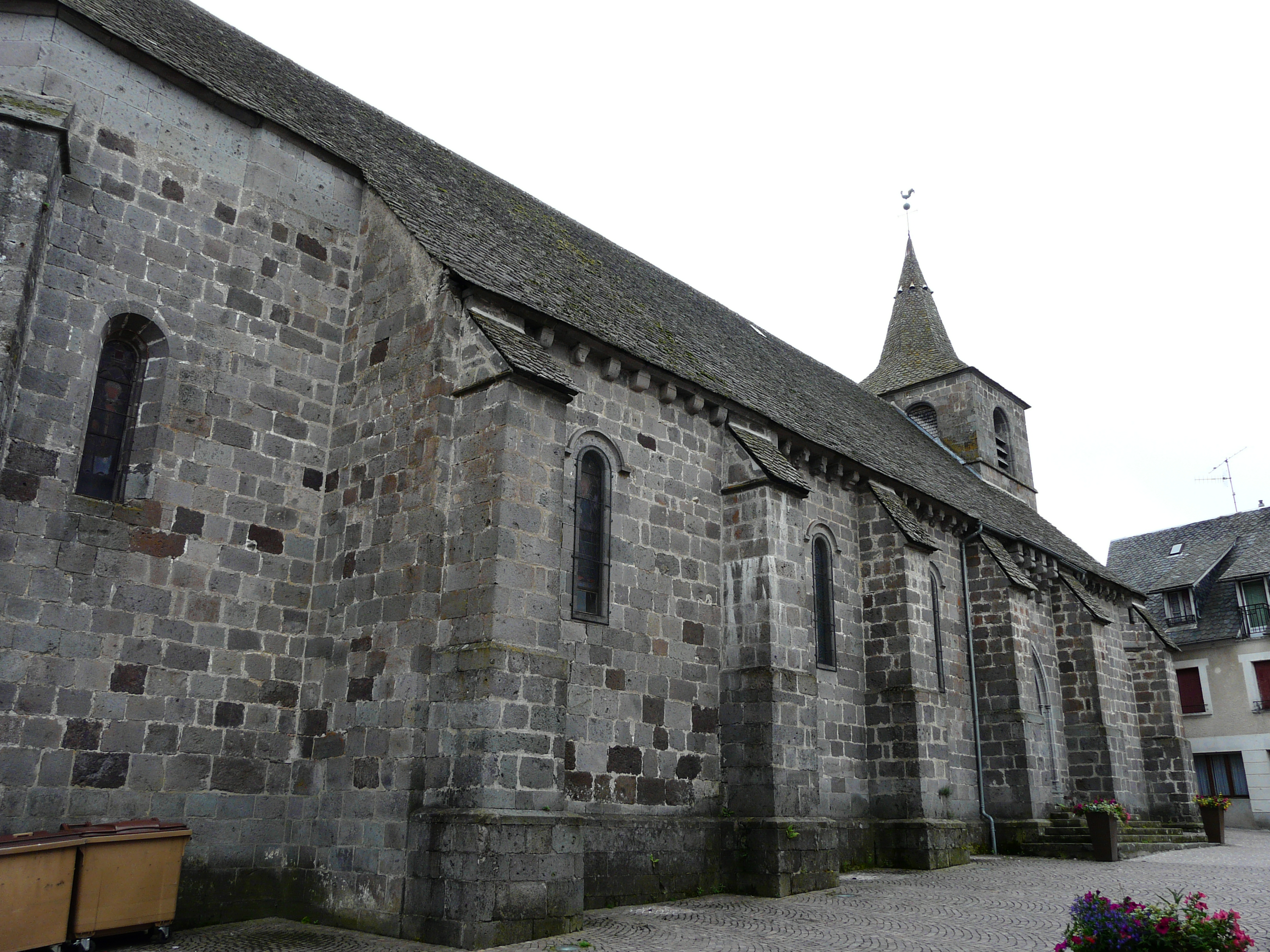 Le côté nord de l'église Notre-Dame, Tauves, Puy-de-Dôme, France.